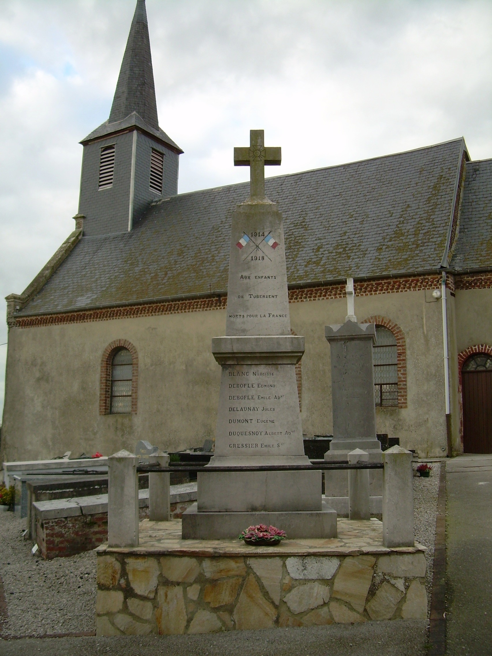 Monument aux morts de Tubersent.